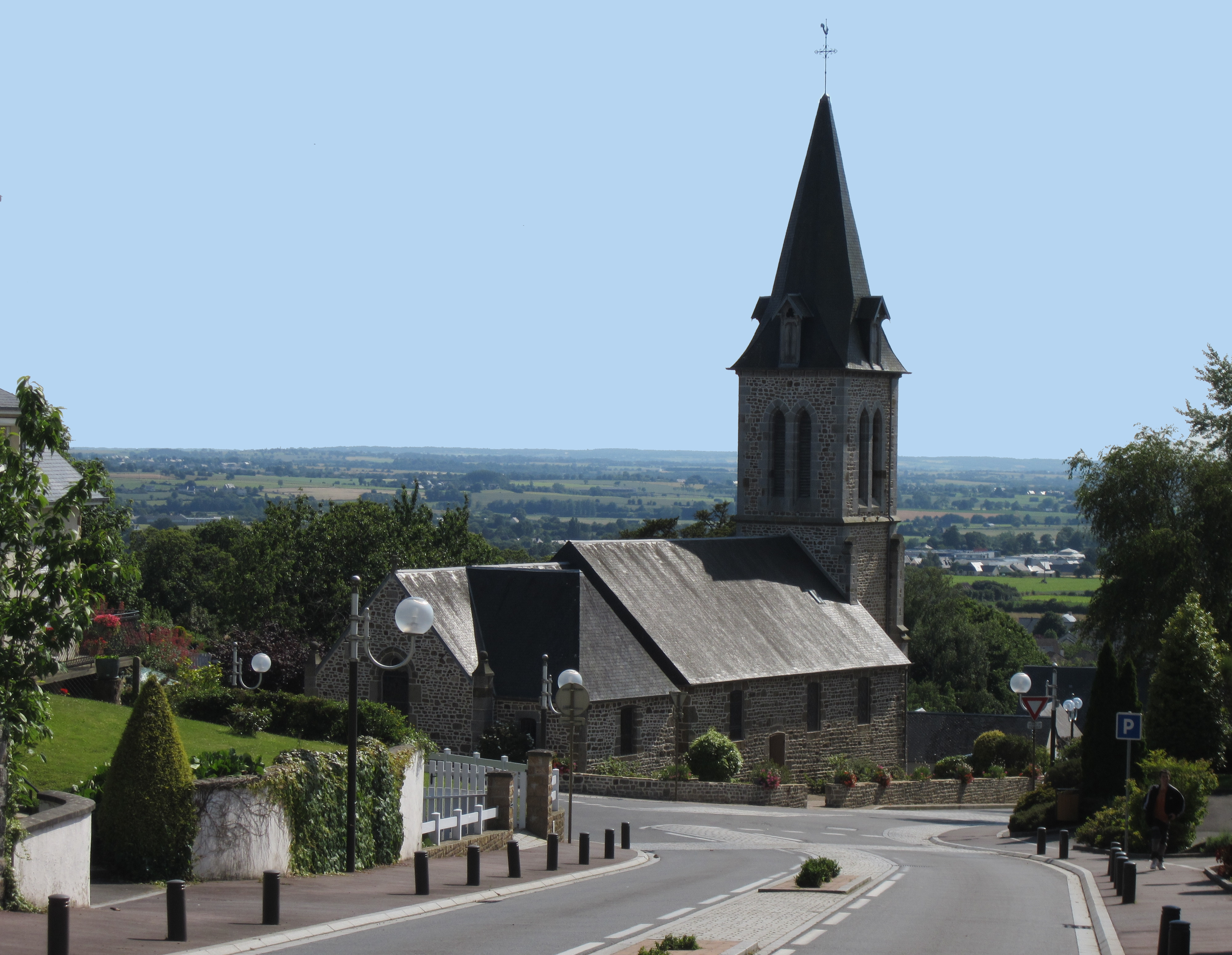 église de Saint-Martin-des-Champs